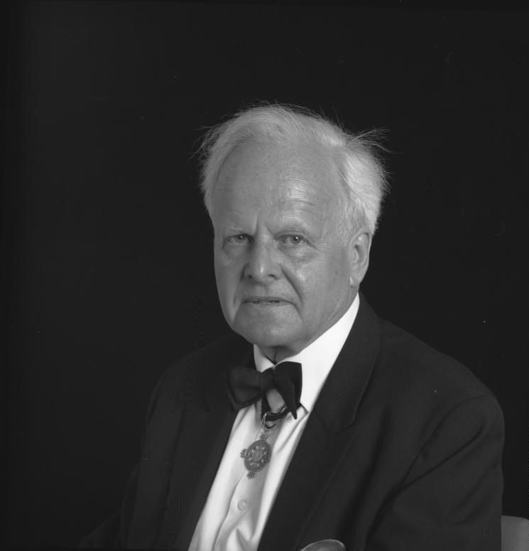 Prof. Dr. Carl Friedrich Frhr. von Weizsäcker, Mitglied des Ordens Pour le Merité für Wissenschaften und Künste.